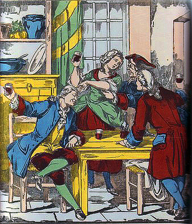 Chanson à boire du XVIIIe siècle